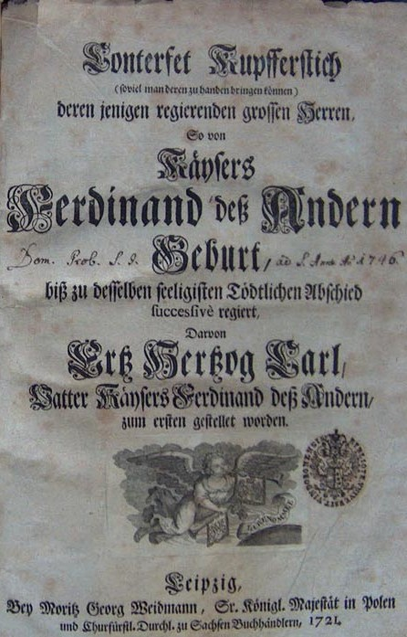 Titelblatt Konterfeiband 1 der Annales Ferdinandei